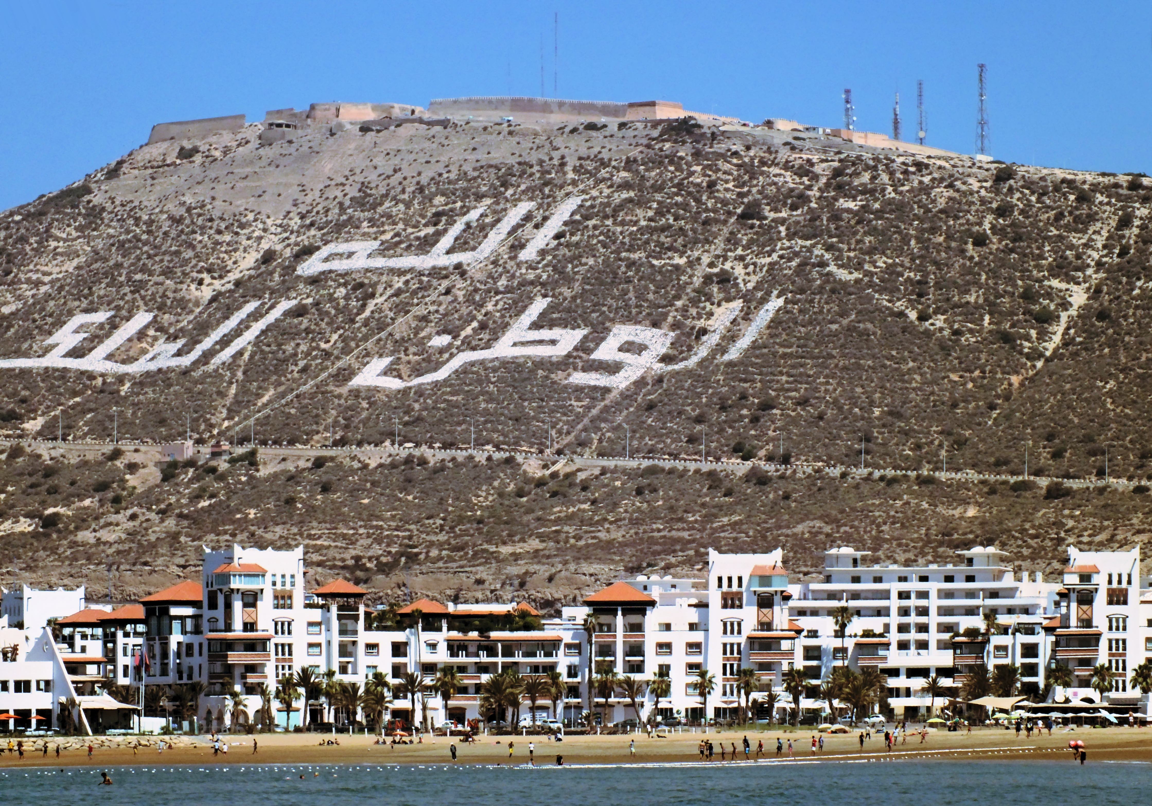 Agadir, twierdza (kasbah)